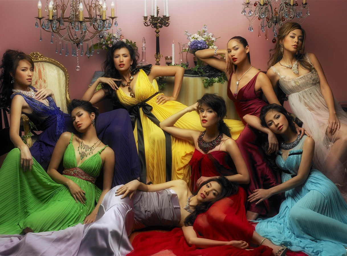 ผู้หญิงถึงผู้หญิงสวย